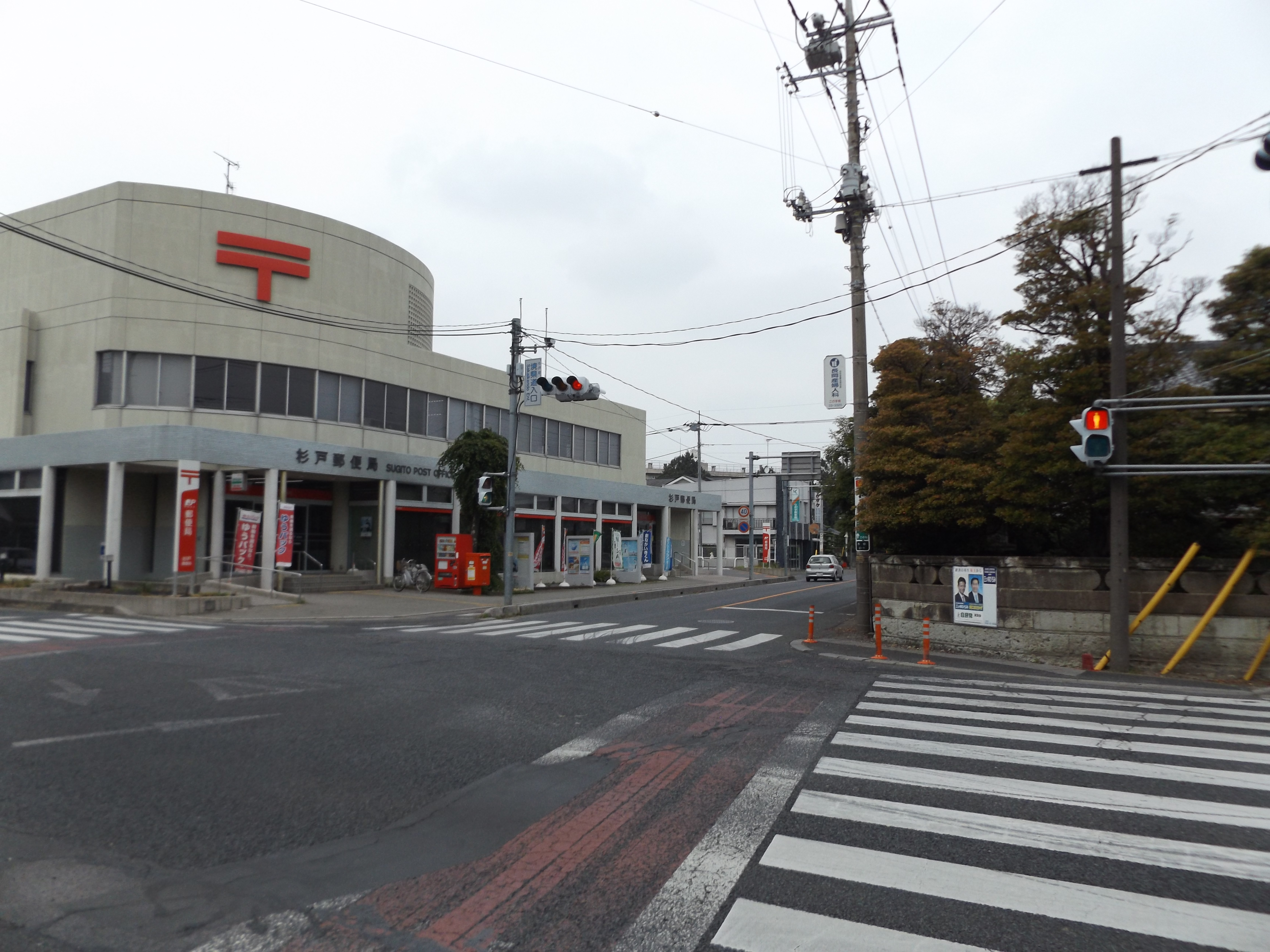 埼玉県南北葛飾郡杉戸町にある、国道4号の境県道入口交差点。 茨城県道・千葉県道・埼玉県道26号境杉戸線および埼玉県道408号東武動物公園停車場線の終点である。